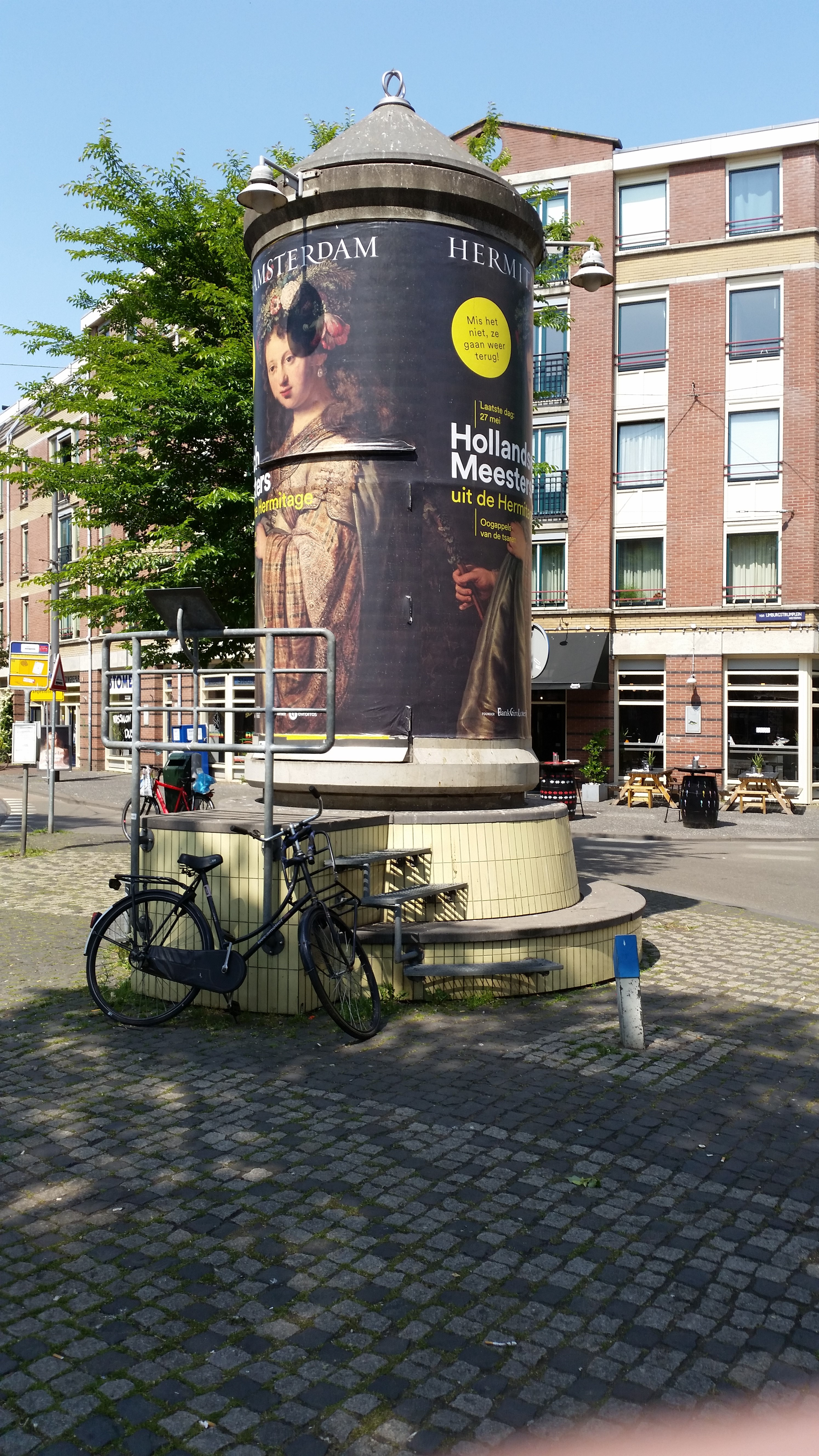 Van Limburg Stirumplein, Amsterdam; Peperbus van Abri en peperbus